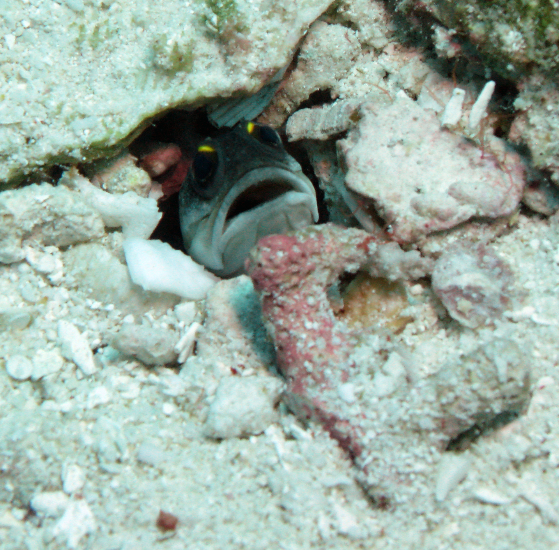 Goldbandbrunnenbauer (Opistognathus sp.)